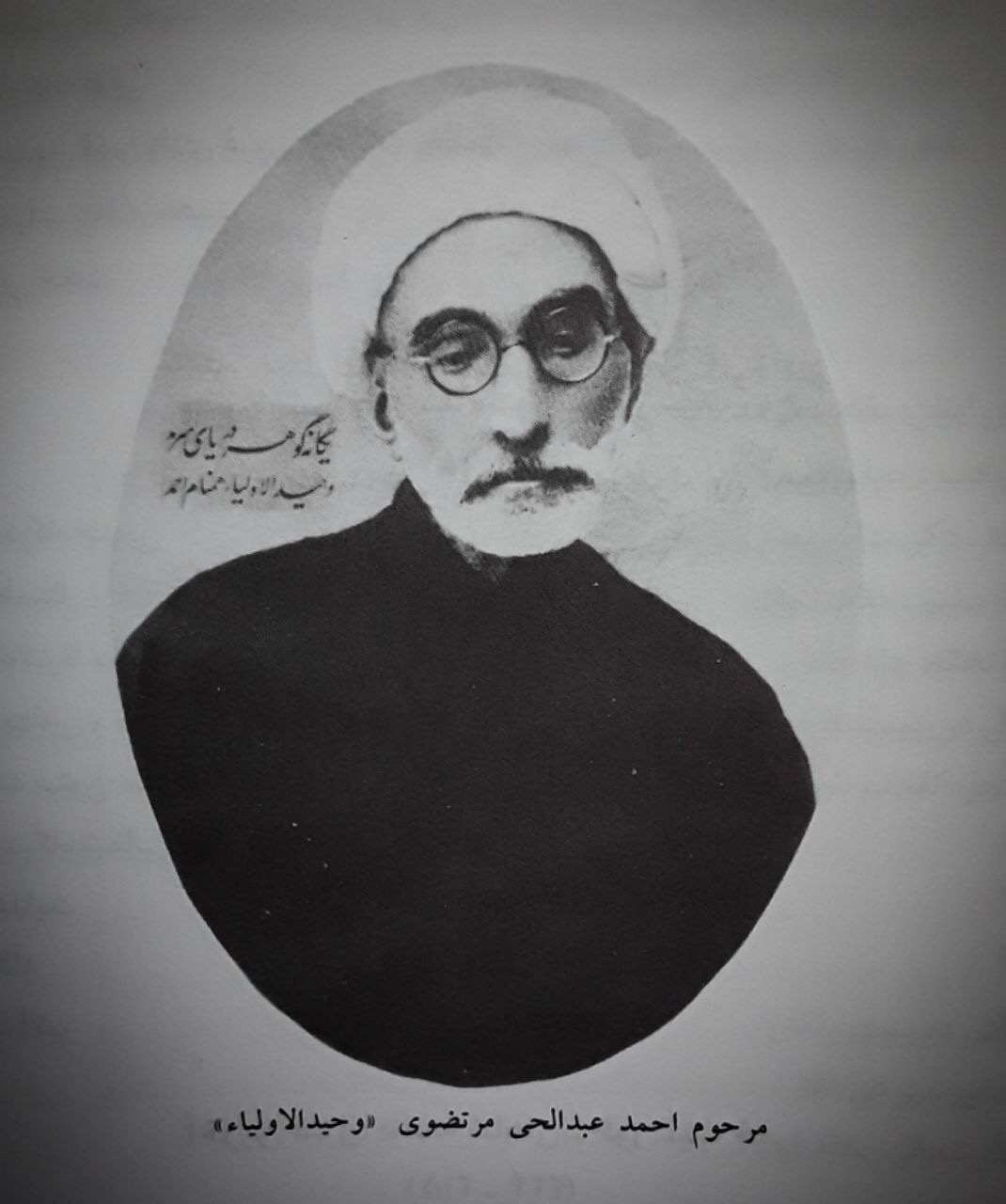 تمثال جناب عبدالحی میرزا احمد اردبیلی خوشنویس قطب 37 سلسله ذهبیه ملقب به وحیدالاولیا و نایب التولیه و مزین الحرم